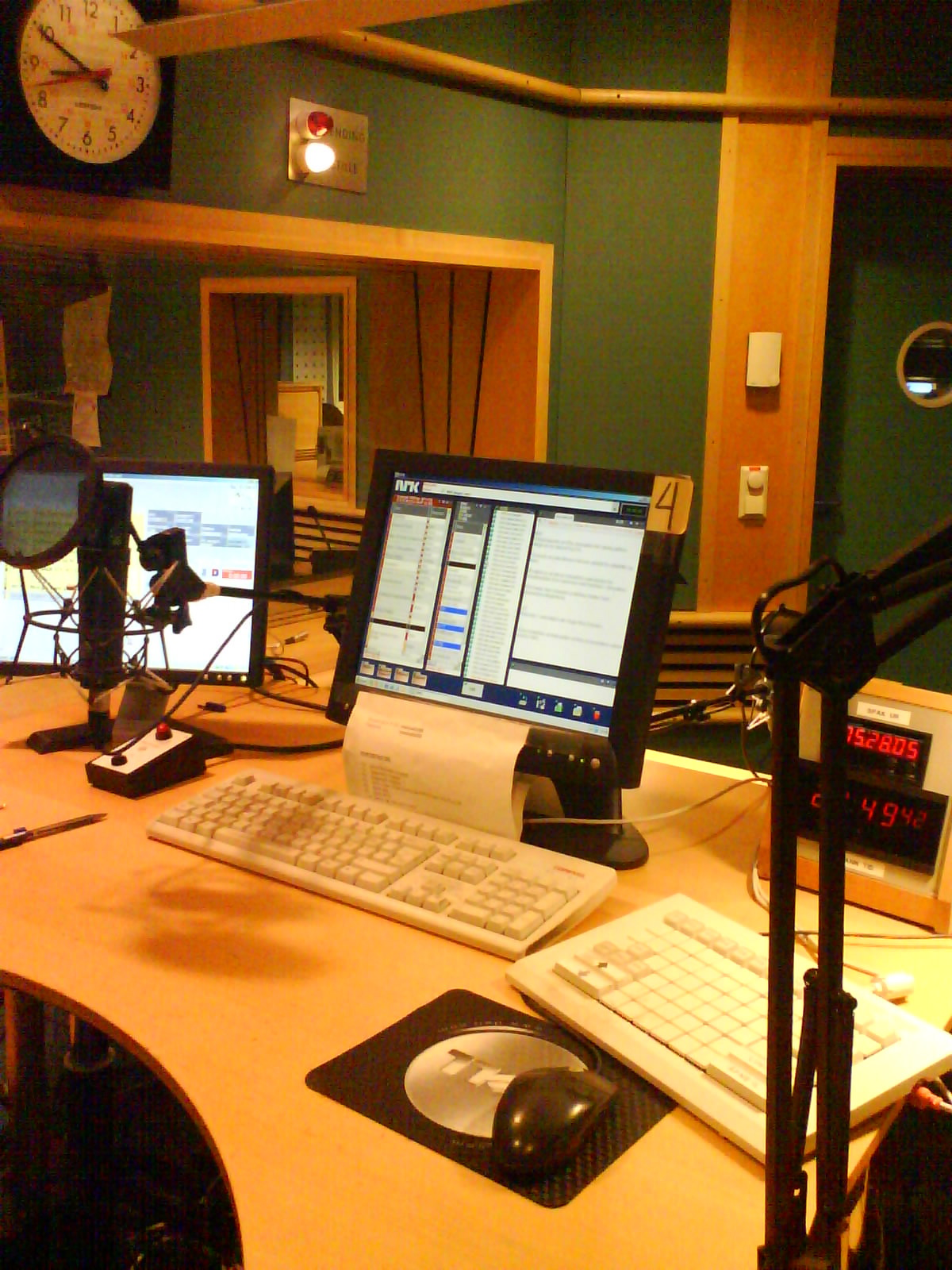 NRK Dagsnytt, studio K50